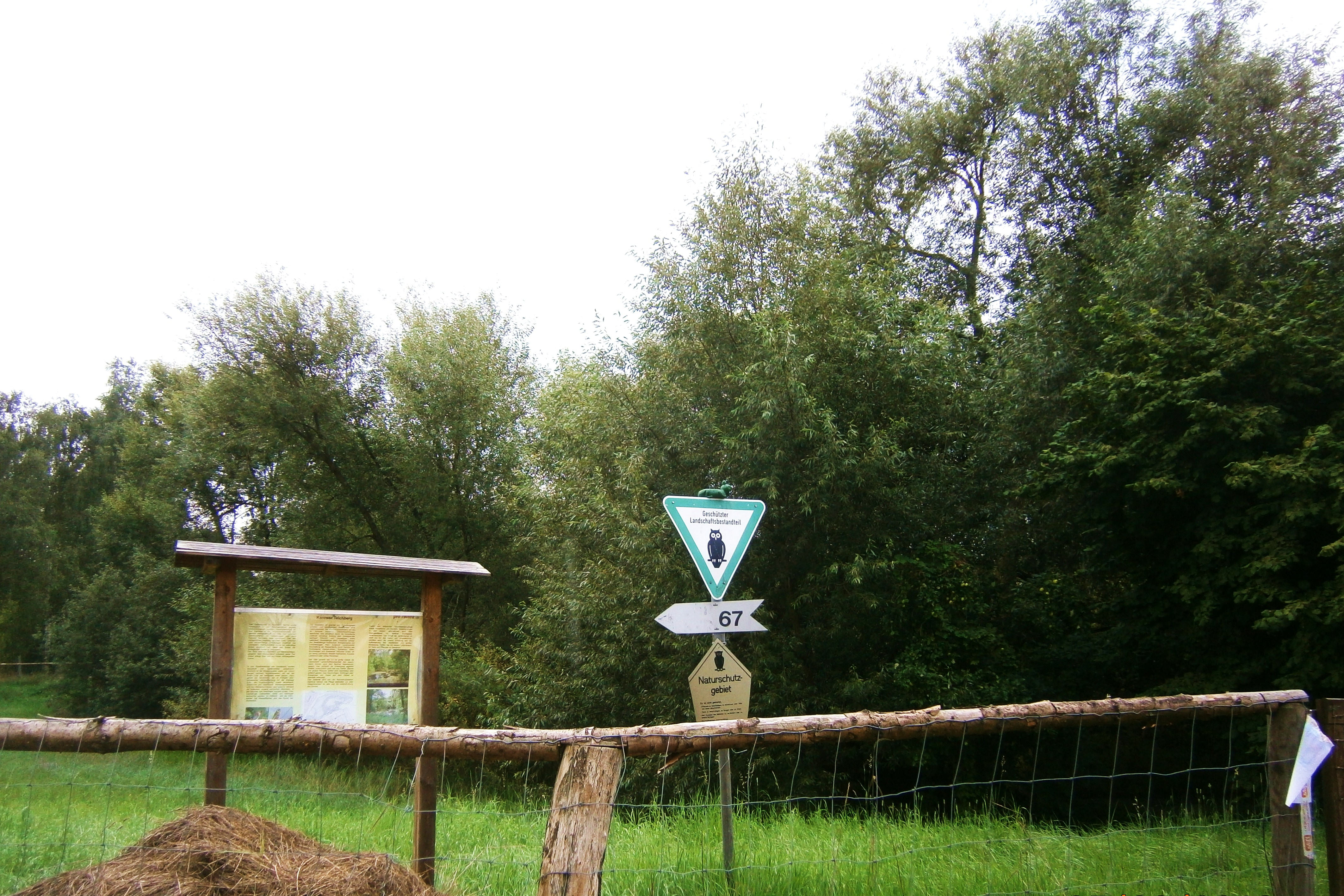 Geschützter Landschaftsbestandteil "Karower Teichberg" :Straße im Ortsteil Berlin-Karow (Blickrichtung: )